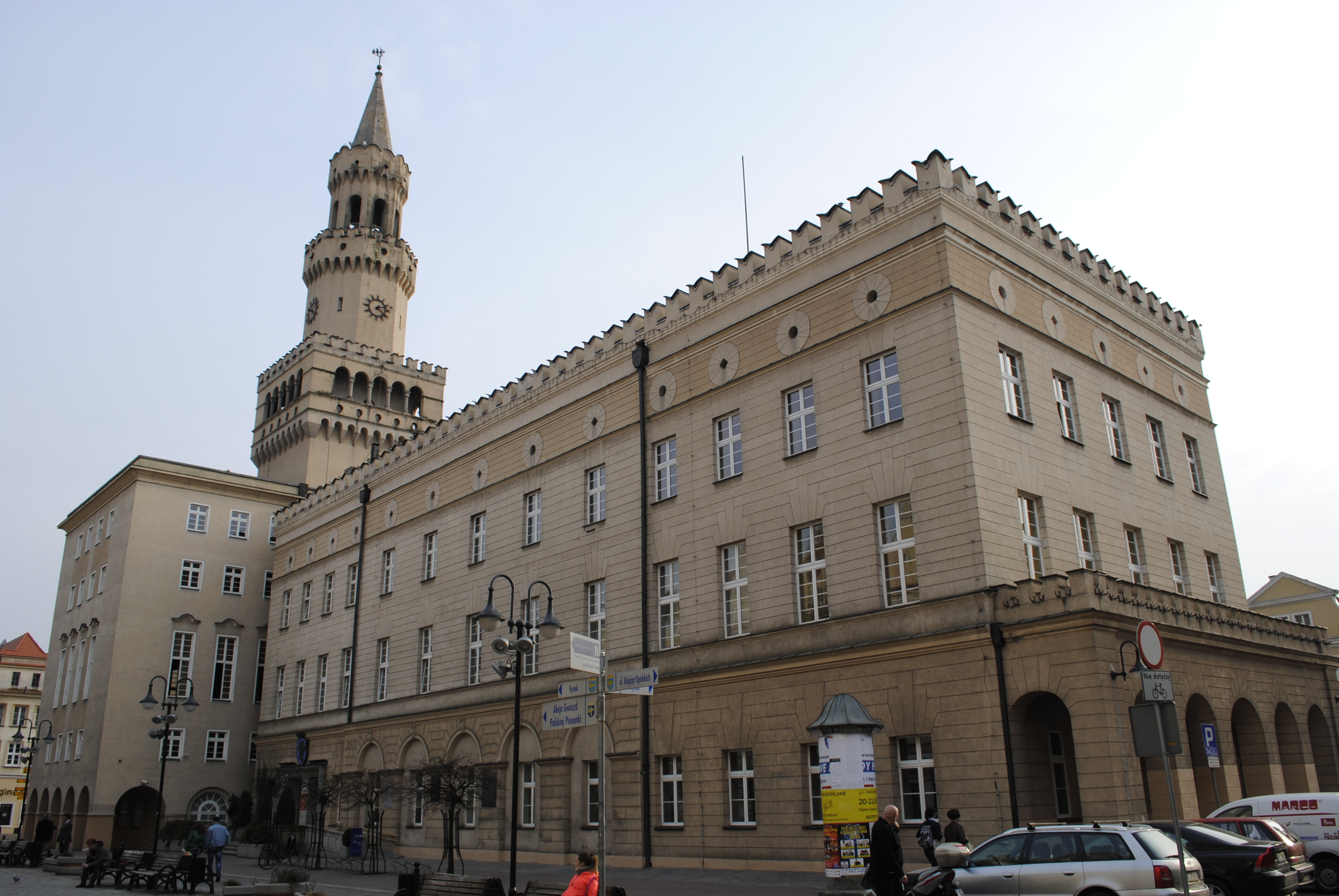 Rathaus Oppeln